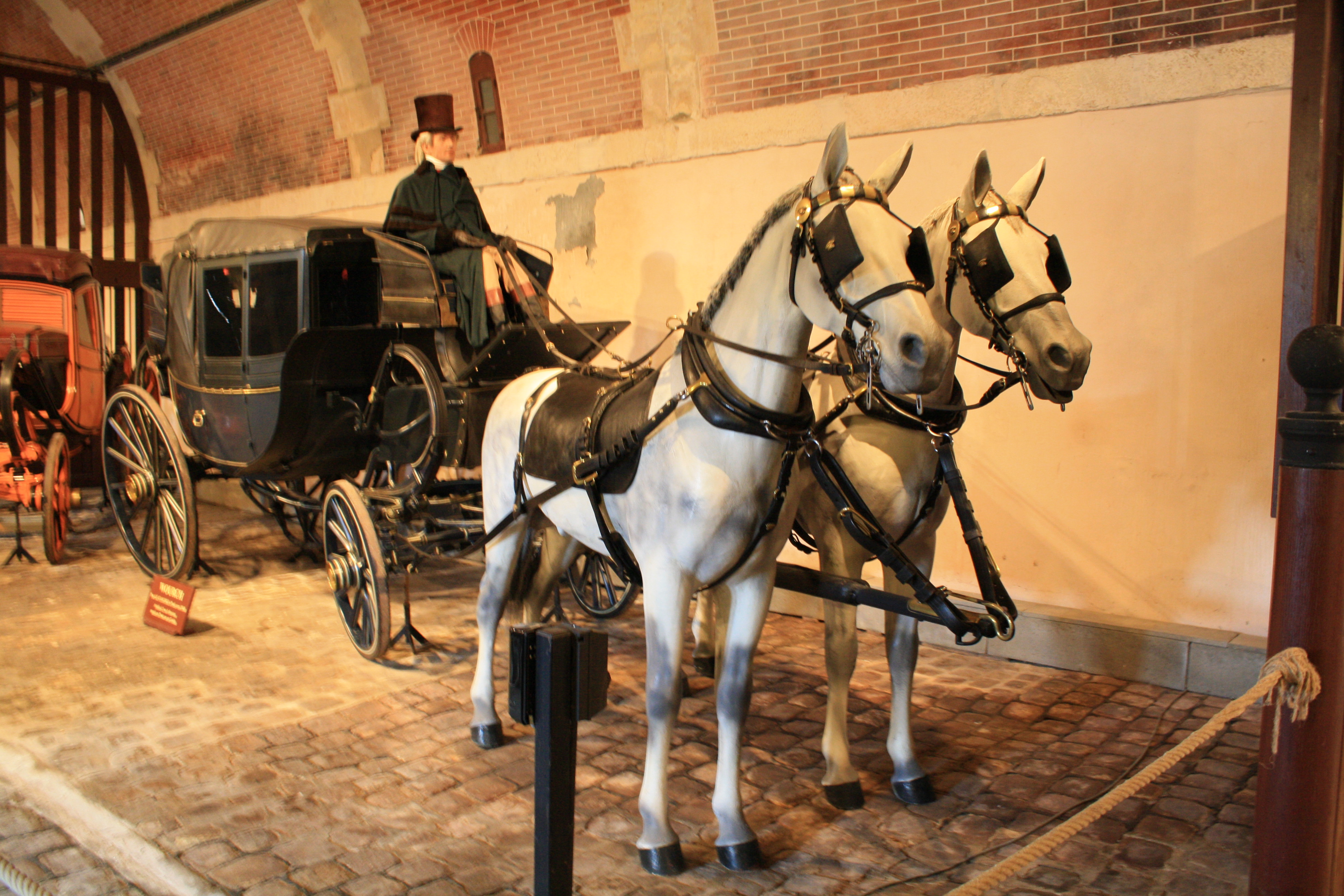 Wourch, calèche transformable à deux ou quatre chevaux qui peut se fermer entièrement l'hiver. Évolution au début du XIXe d'une voiture hippomobile appelée aussi Wourst ou Wurst (Source ? [1]). Modèle exposé au Musée des équipages de Vaux-le-Vicomte.